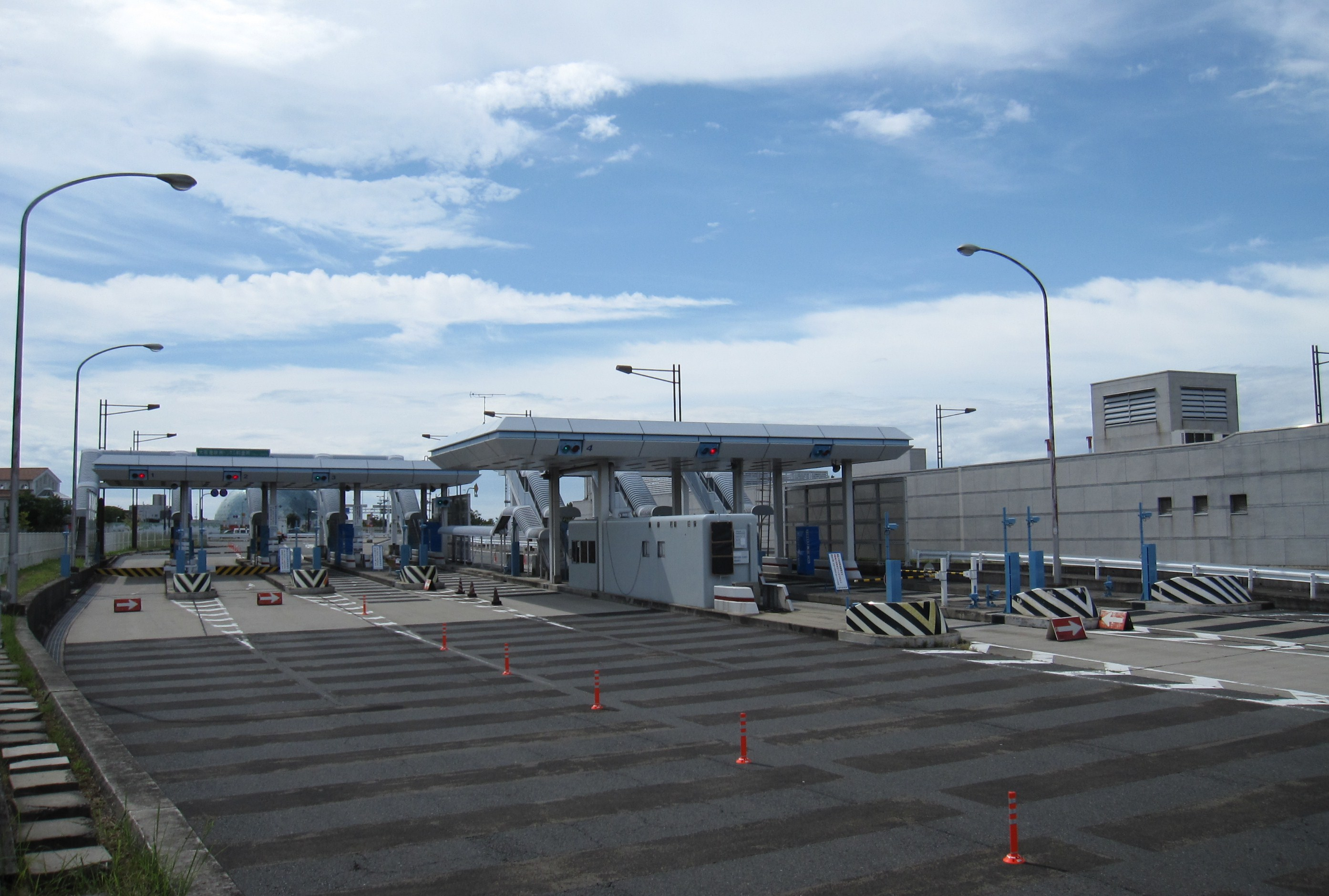 大阪港咲洲トンネル料金所